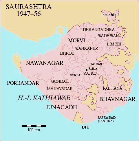 Karte von Saurashtra